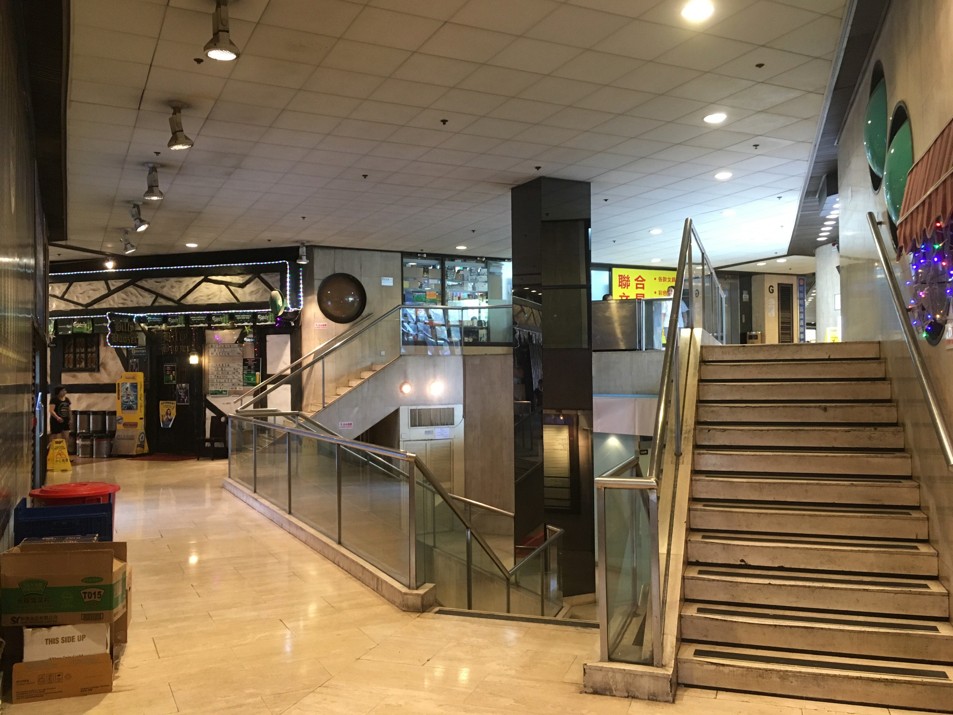 Franki Centre interior